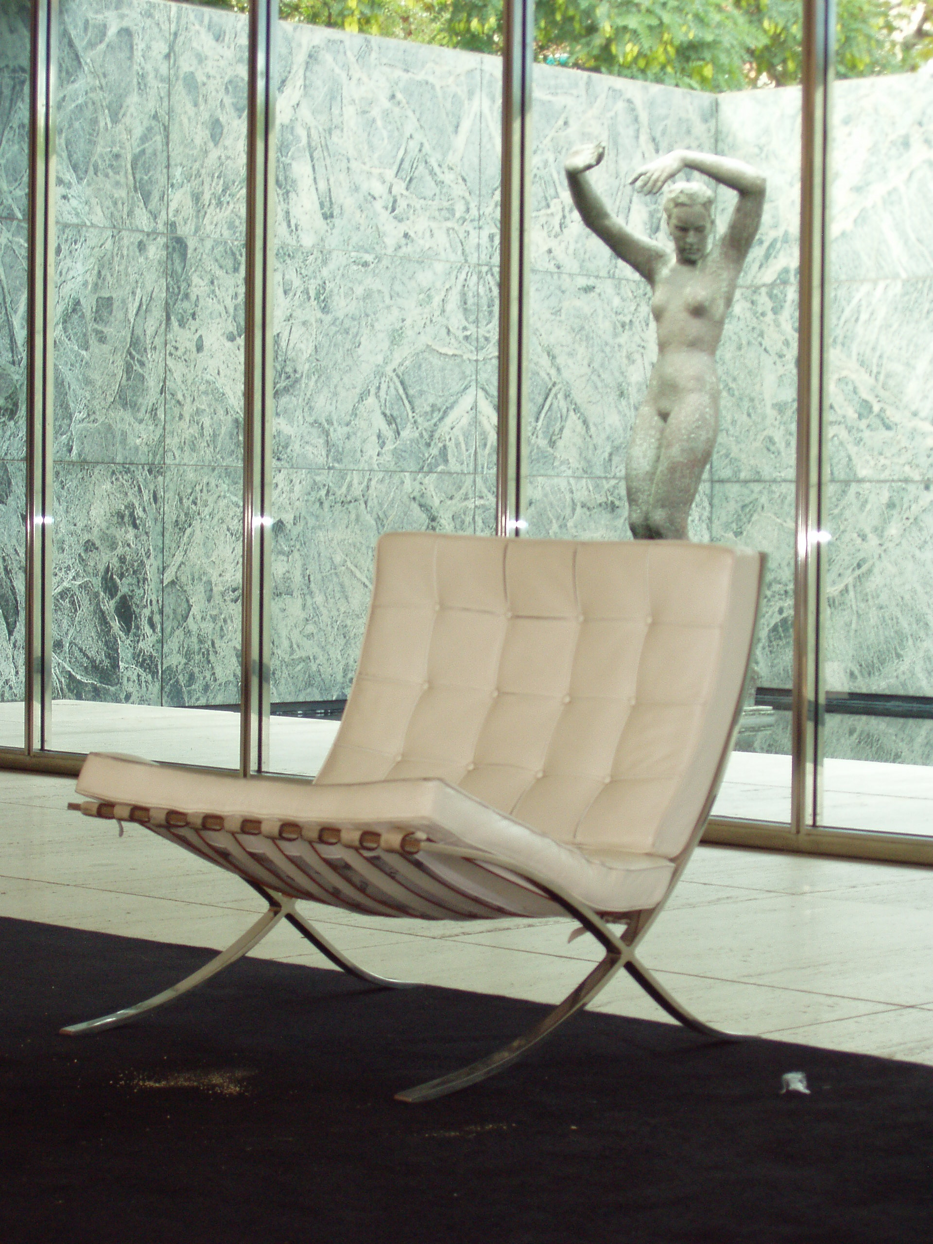 Pabellón de Alemania en la Exposición Universal de Barcelona 1929 (reconstruido). Arquitecto Ludwig Mies van der Rohe.